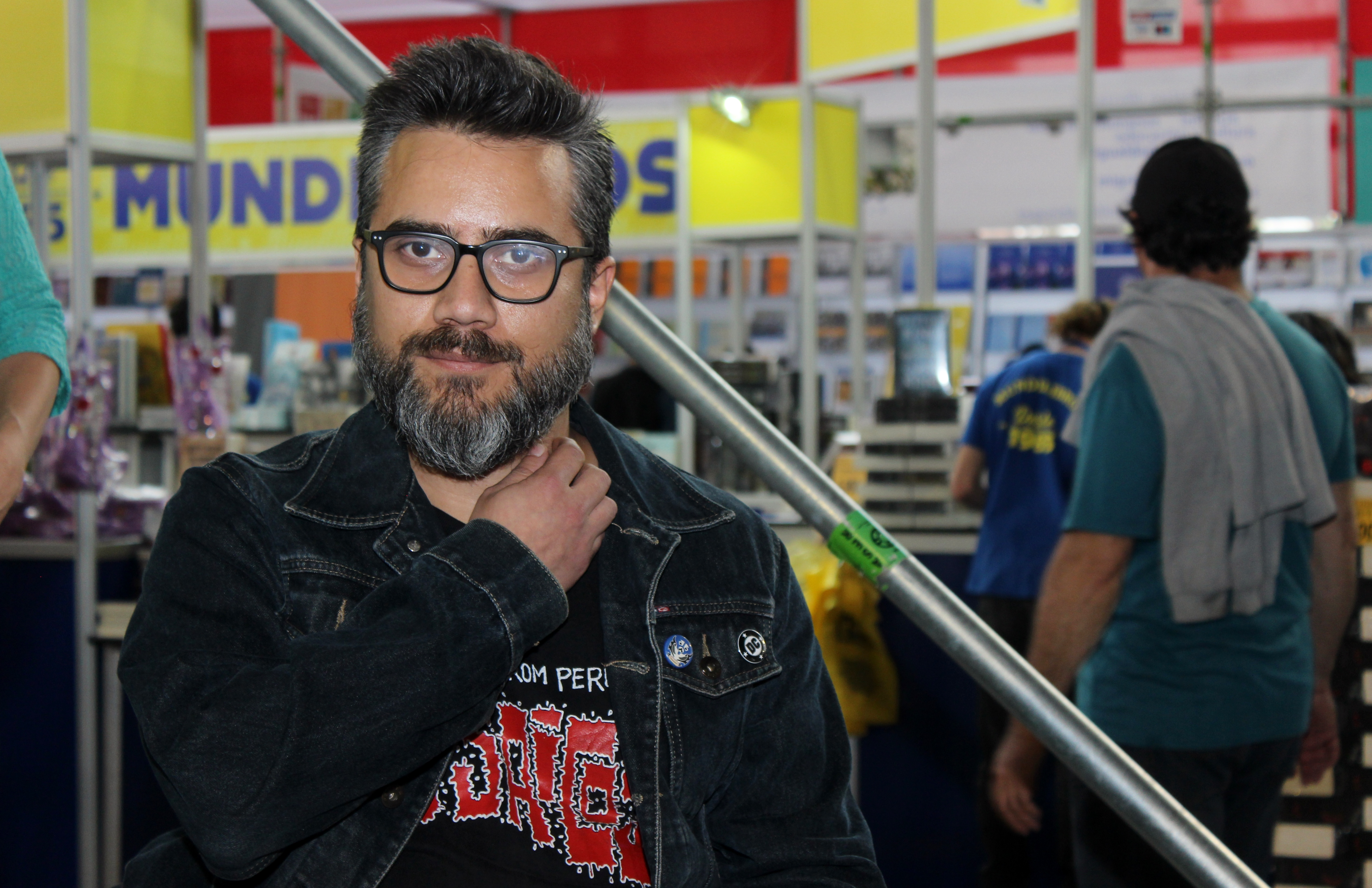 El escritor chileno Daniel Hidalgo en la Feria Internacional del Libro de Santiago 2018.